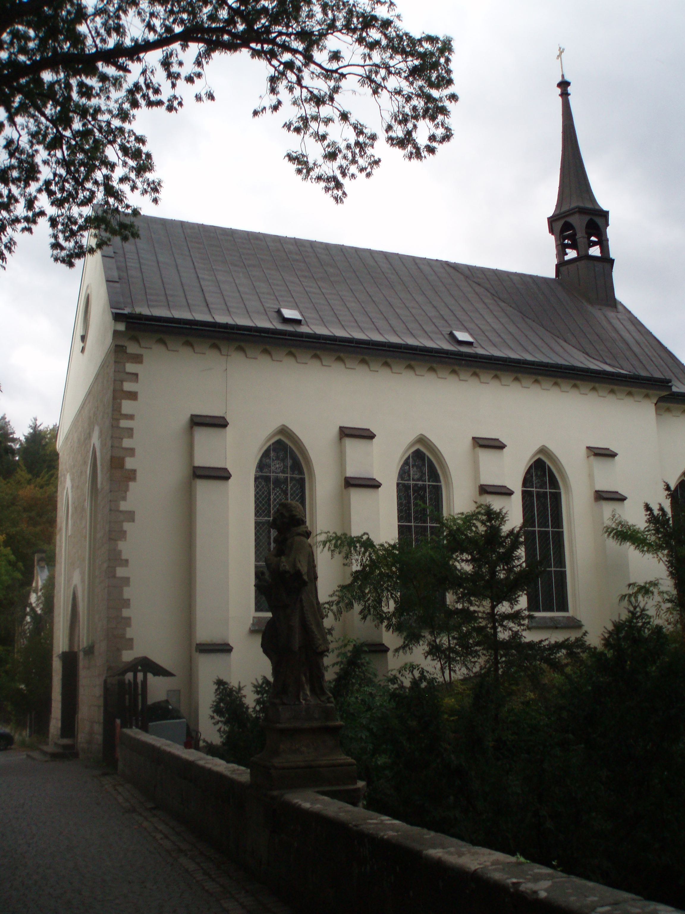 Kostel svatého Josefa, při zámku, Hrubá Skála.